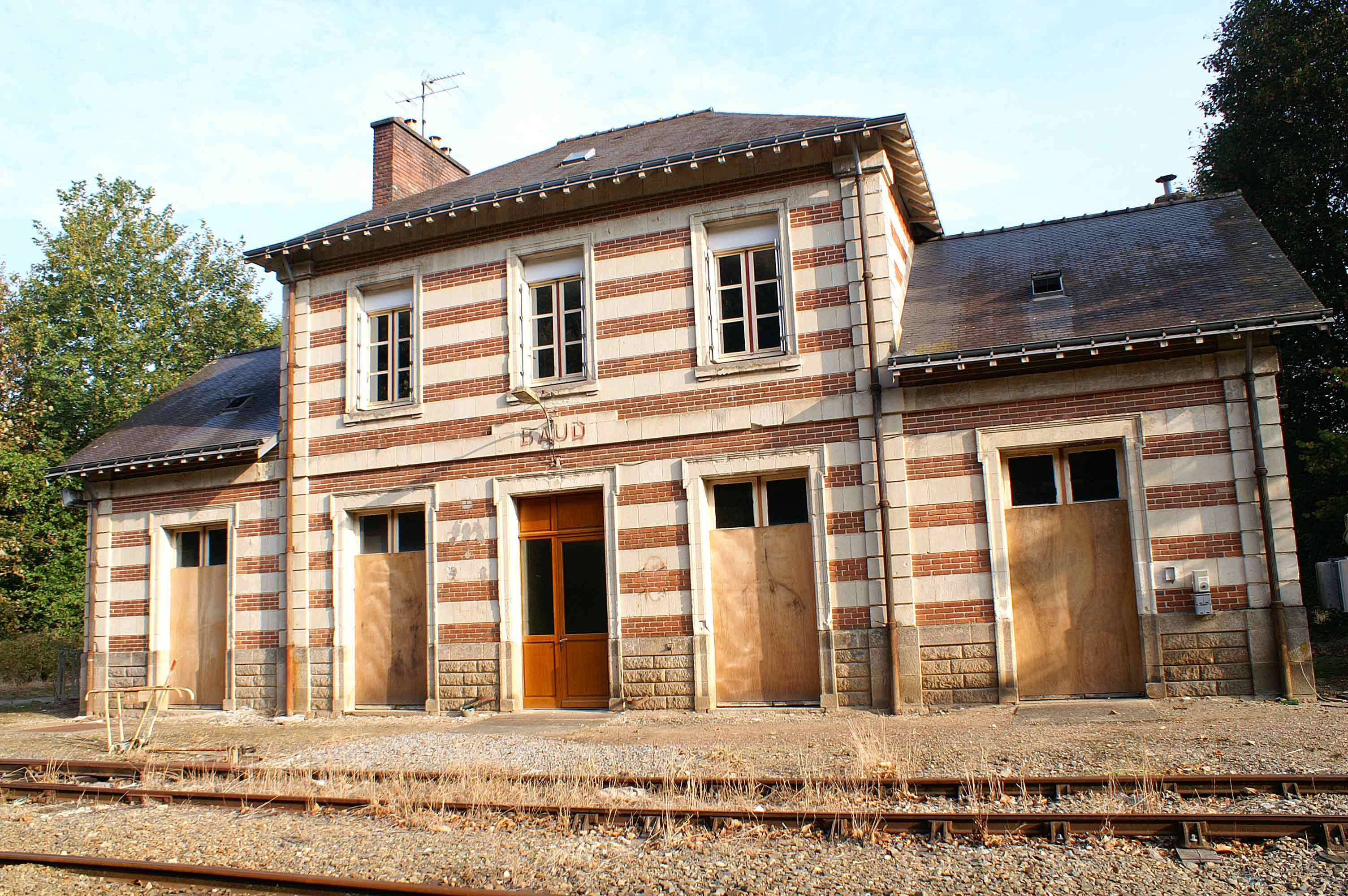 La gare de Baud, bâtiment voyageur fermé vue des voies.